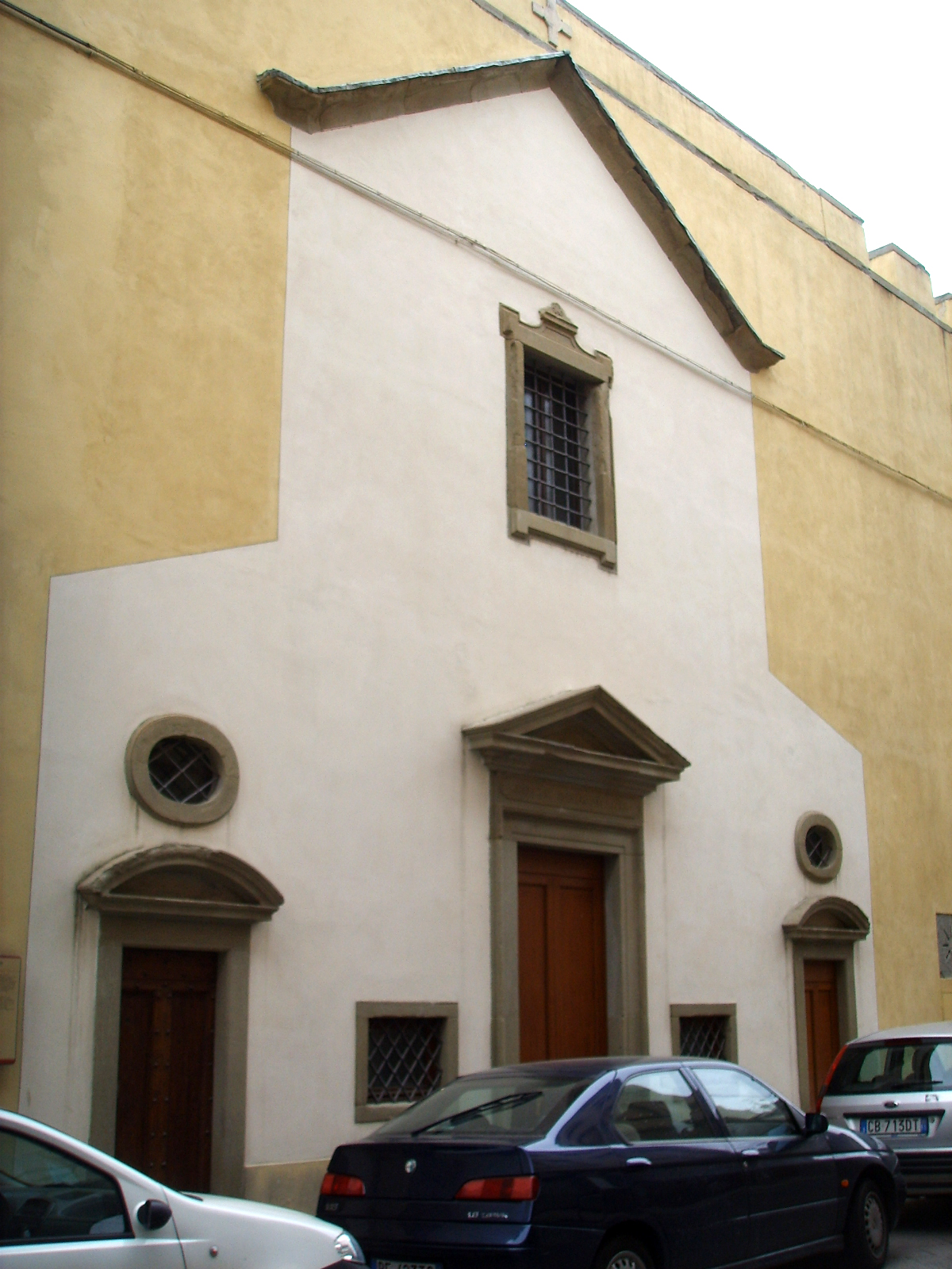 Cappella di santa maria della neve alle murate